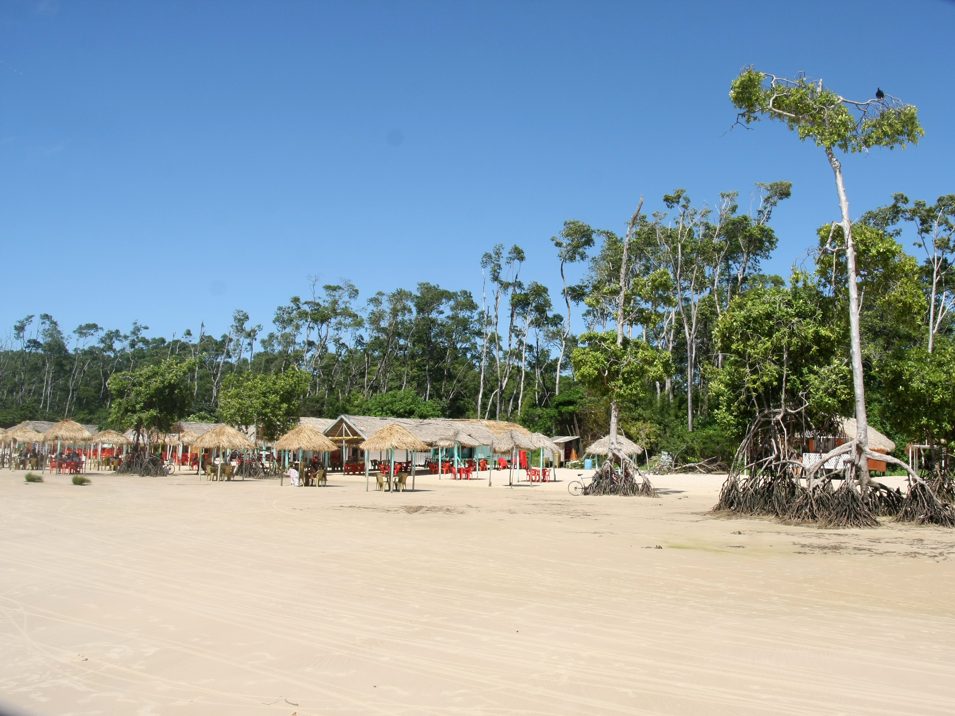 Praia da Barra Velha - Soure - Ilha do Marajó - Pará